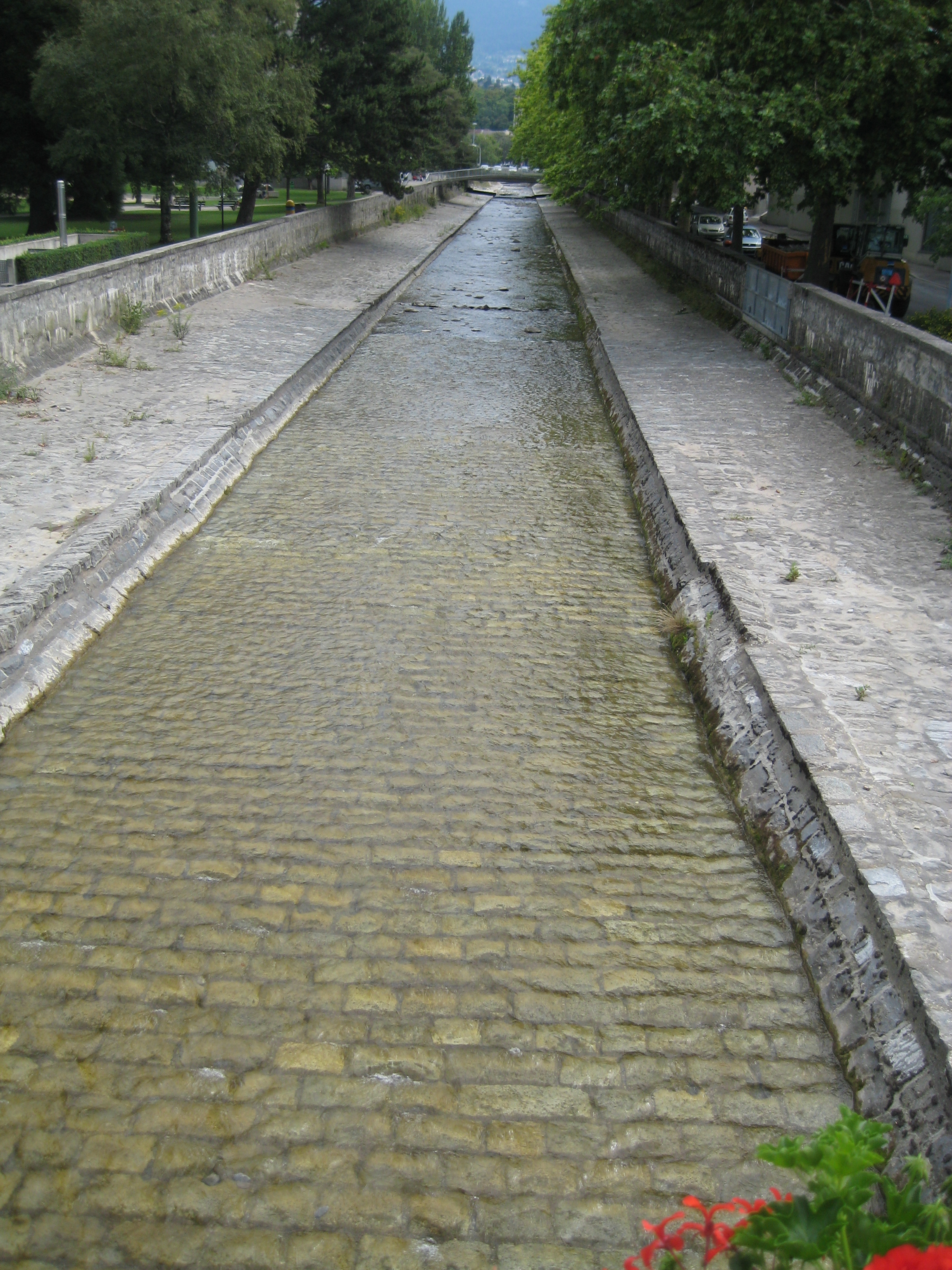 La rivière Veveyse à son embouchure à Vevey